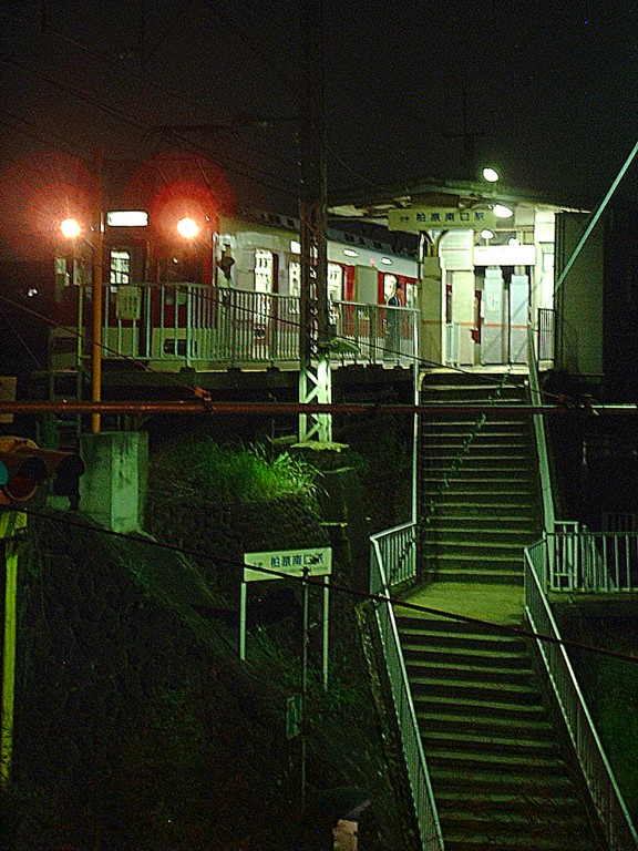 夜の柏原南口駅 道明寺行きワンマン電車が停車中 2005年 Bakkai撮影